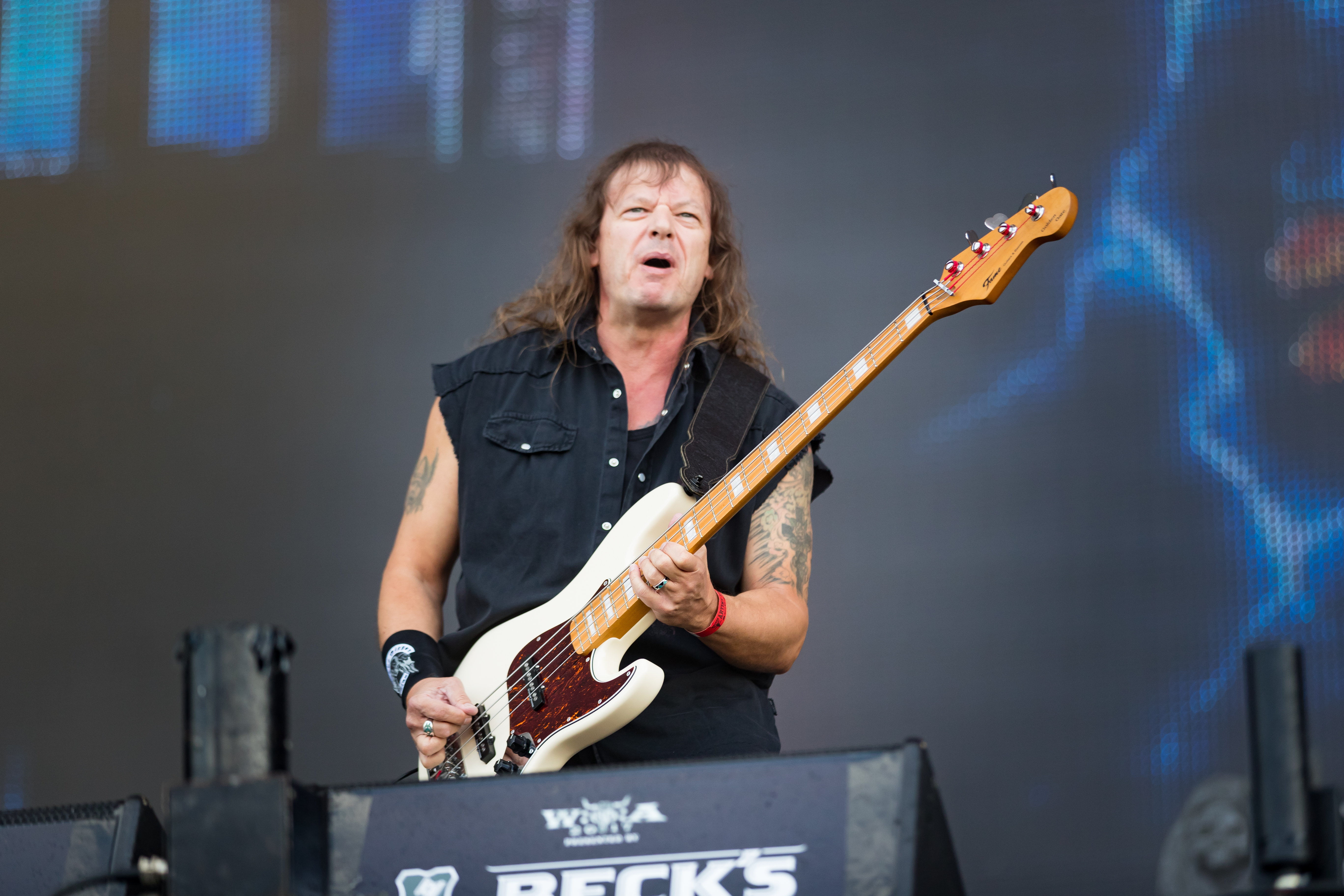 Grave Digger during Wacken Open Air at Schleswig-Holstein, Wacken, , Germany on 2017-08-04, Photo: Sven Mandel